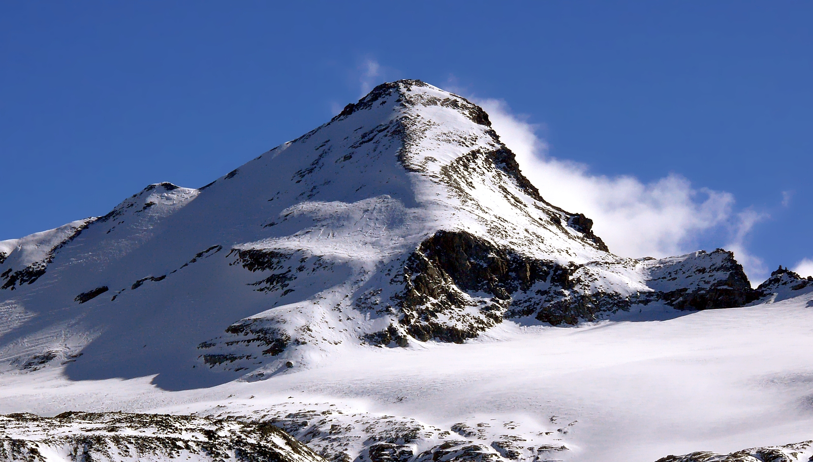 D:\WIKI\tresenta 001.jpg - Alpi Graie - Italy